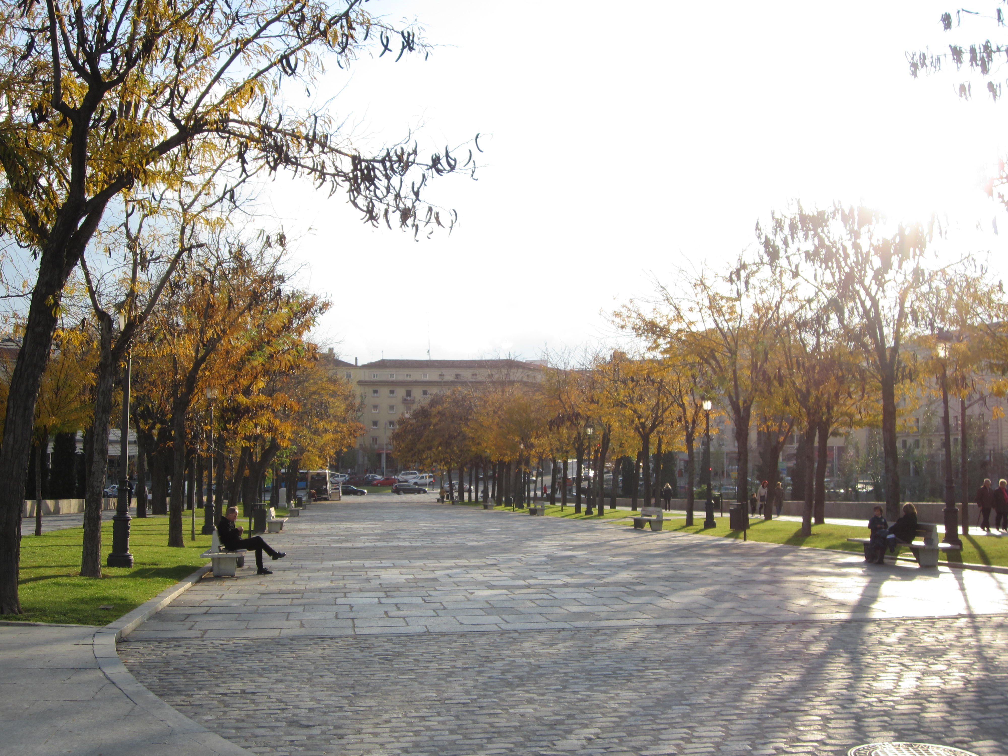 Pedestrian walk, Puente de Toldeo